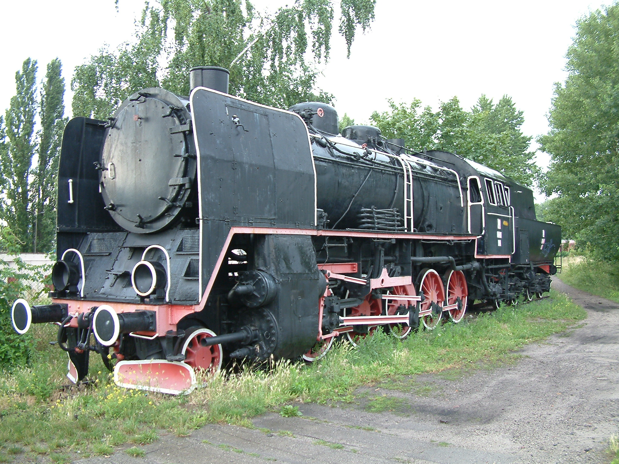 Ty45-94